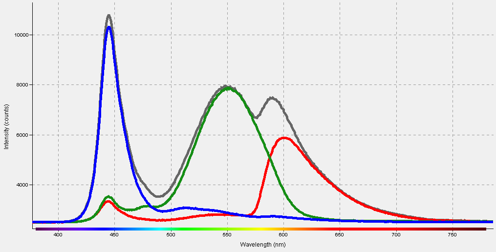 분광기로 측정한 LCD 모니터의 흰색 (회색으로 표시됨), 빨간색, 초록색, 파란색(각각 그 색으로 표시됨) 부분.